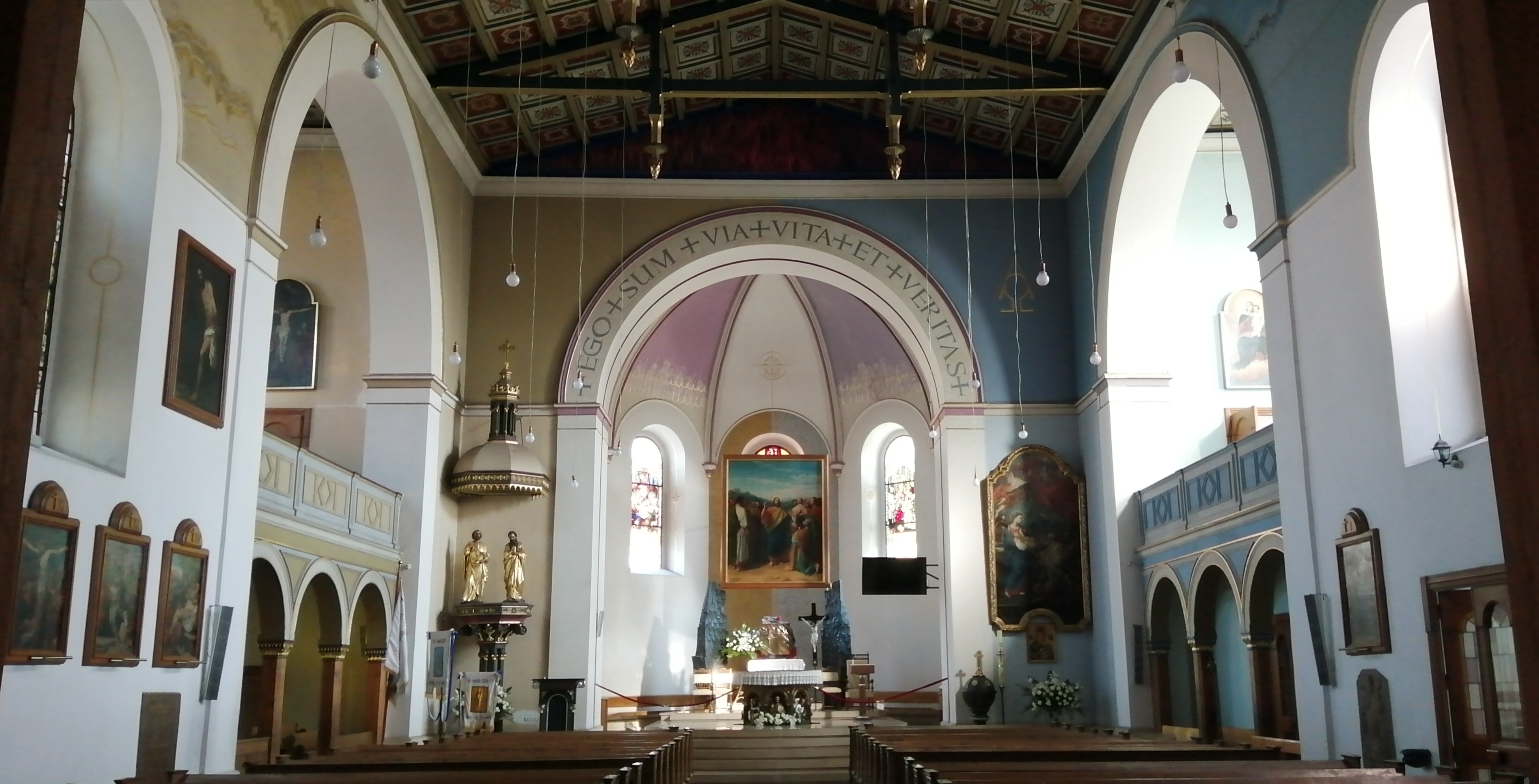 Kościół św. Ap. Piotra i Pawła w Tarnowskich Górach - wnętrze